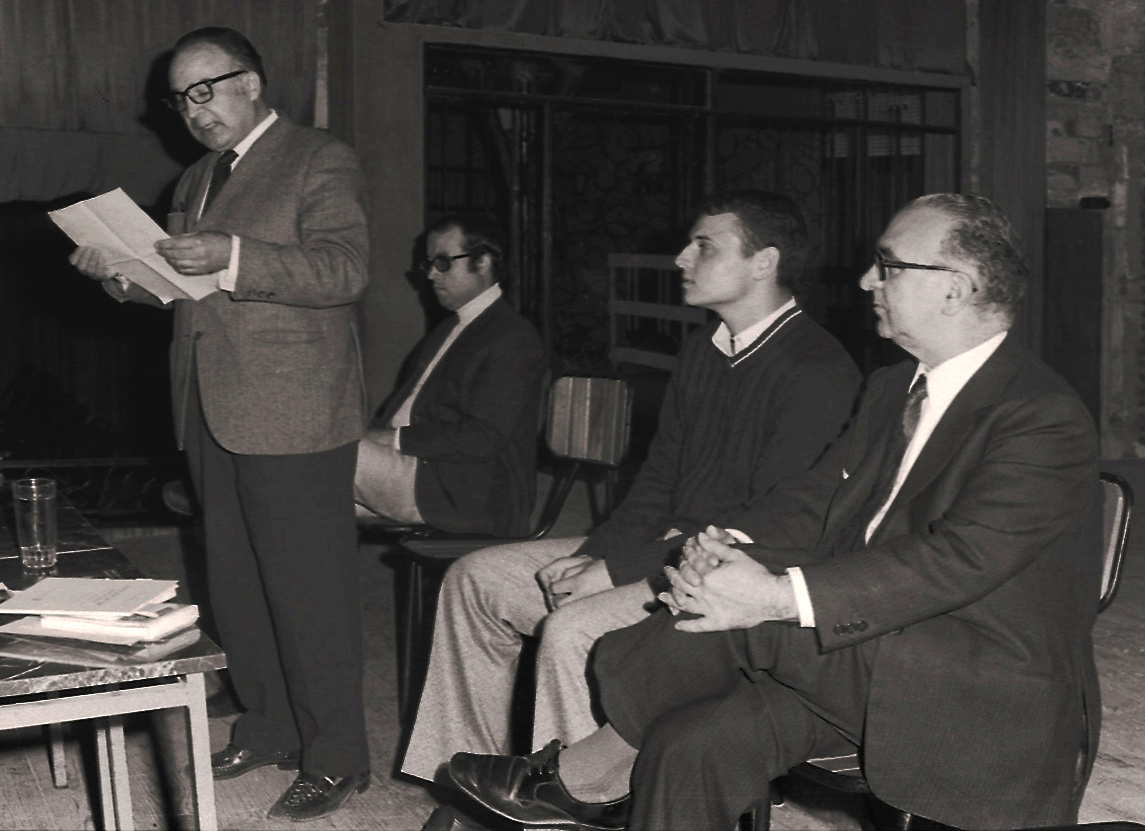 Fotografia d'Ismael Latorre Mendoza, del 06-06-1971, durant el discurs d'En Vicent Hervàs, d'Alginet, administrador de Correus. La foto es va fer a la presentació del poemari titulat Poemes Home-Terra, d'En Josep Lozano i Lerma, al salón Imperio d'Alginet. De dreta a esquerra: Manuel Sanchis Guarner, Josep Lozano i Lerma i Vicent Espí.